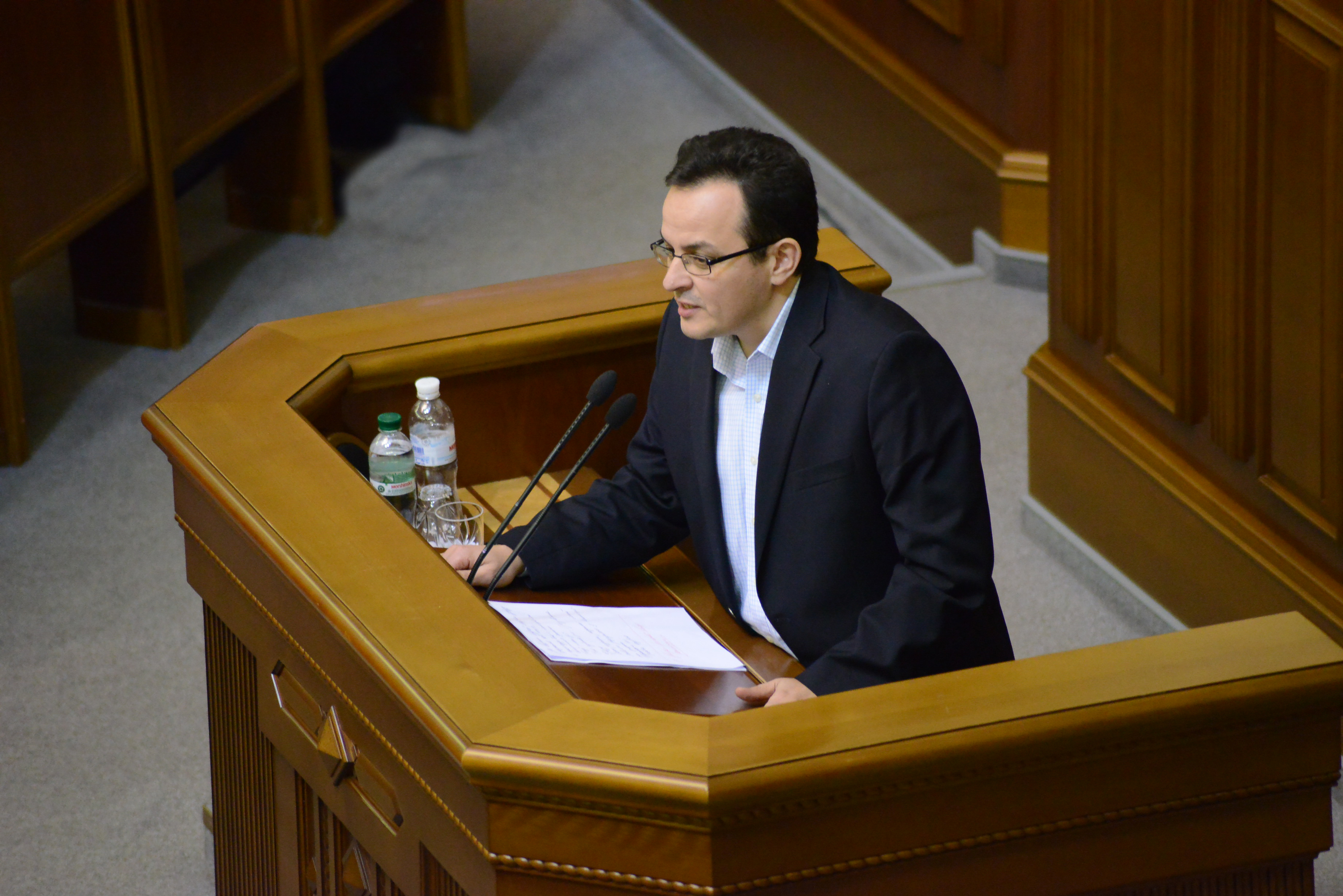 ВЕРХОВНА РАДА УКРАЇНИ 2015 фотограф Вадим Чуприна